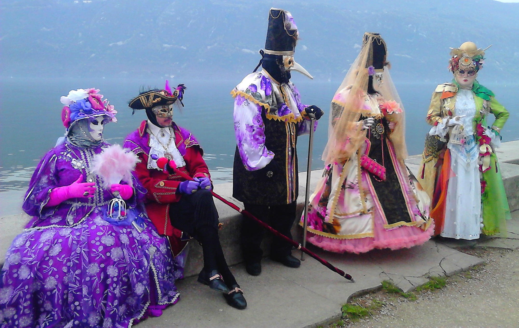 Déambulations du cortège de personnages déguisés à l'occasion du carnaval vénitien organisé par la ville d'Aix-les-Bains (en 2016).